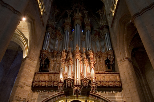 Orgue de la cathédrale Notre-Dame de Rodez